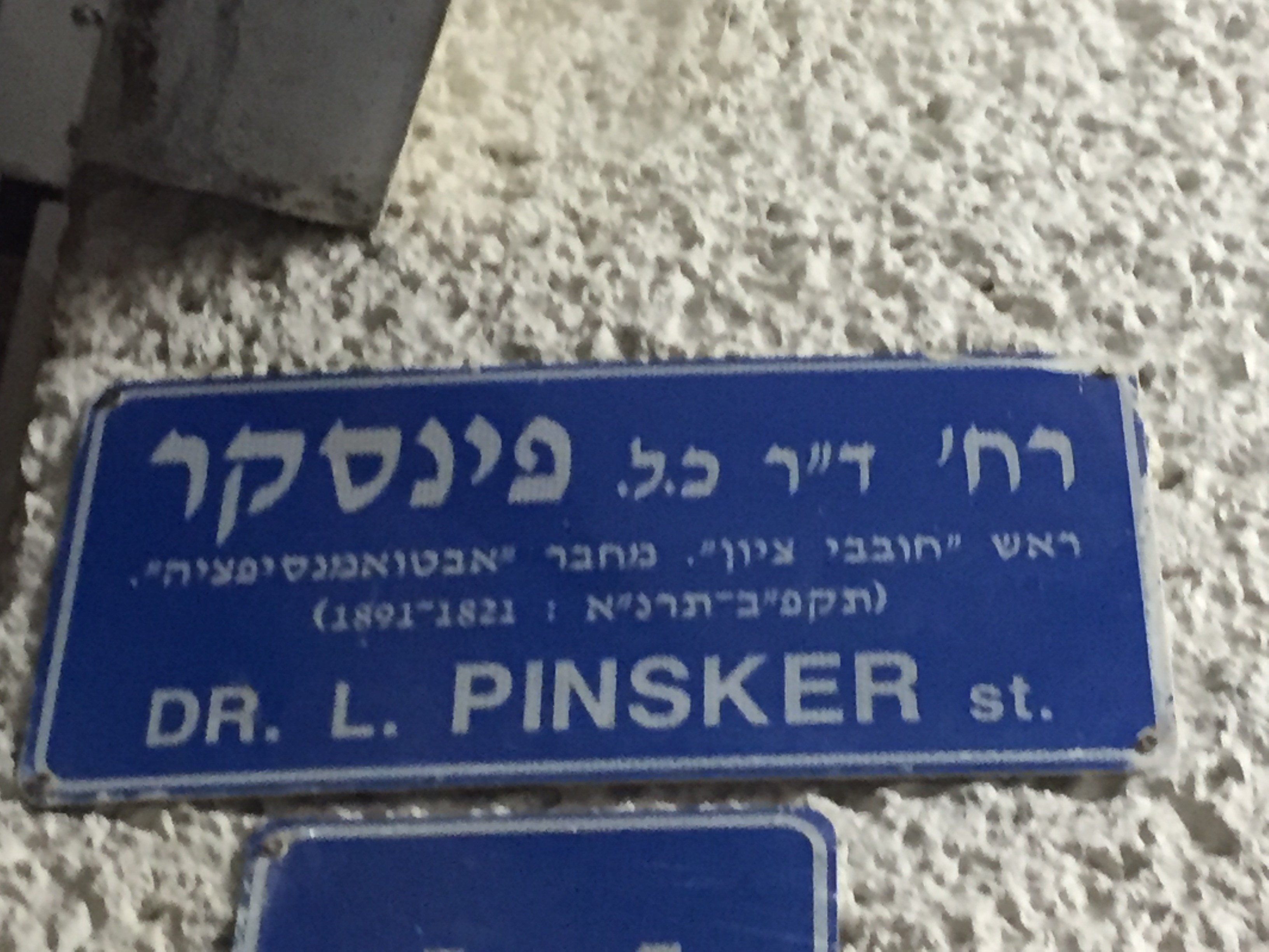 שלט רחוב עם שמו של פינסקר